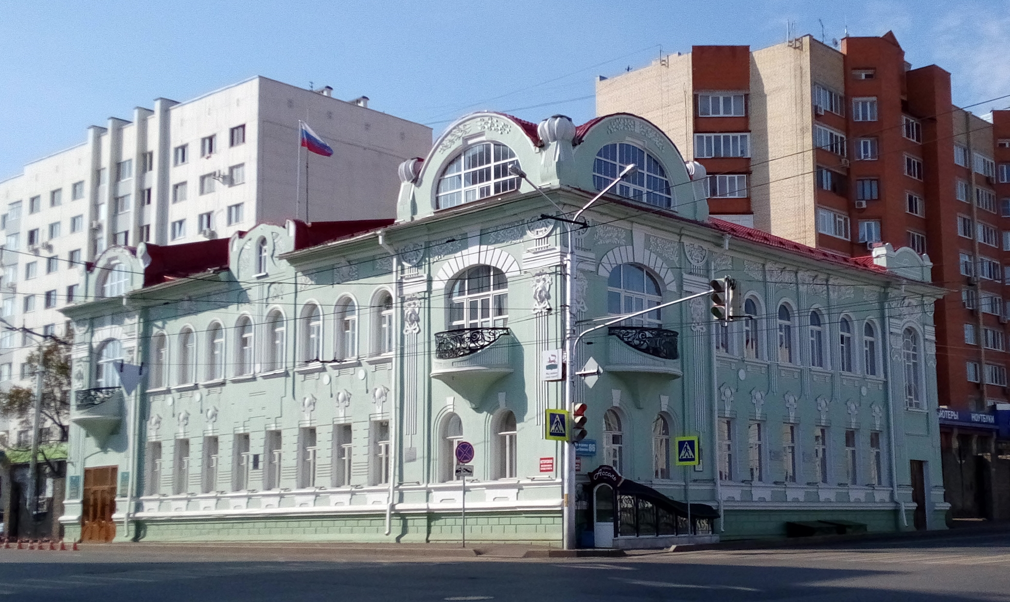 Дом купца Костерина: улица Пушкина, 86, Уфа, Башкортостан